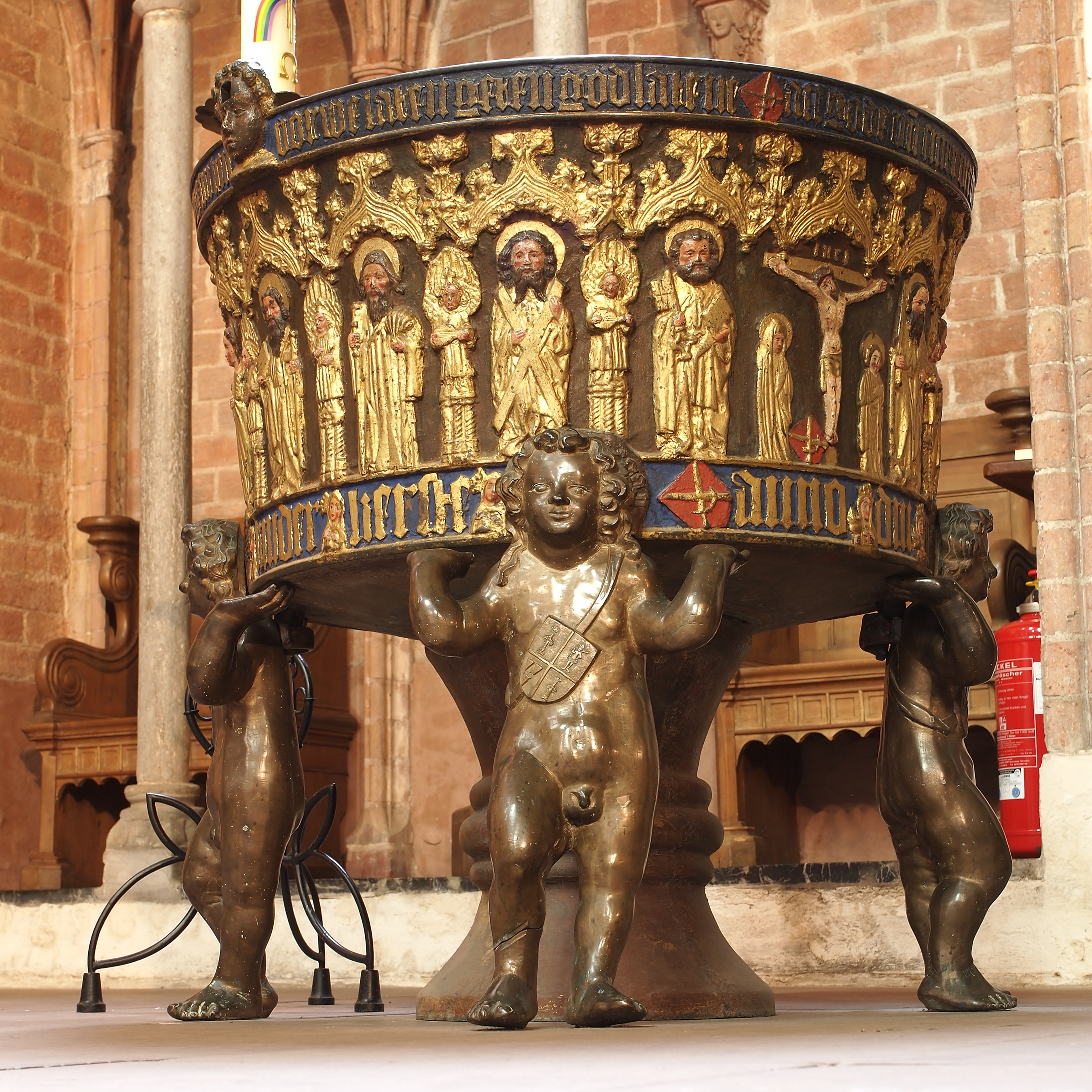 Bronzefünte von 1480 im St. Petri Dom zu Schleswig, Ansicht von Norden